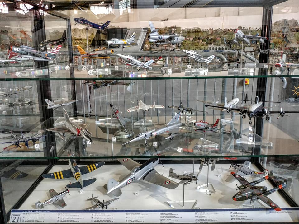 La collezione Piazzai presso Volandia